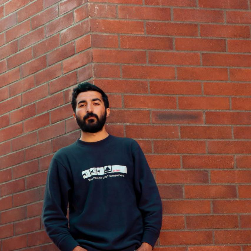 کوردی: حەکیم ئارتێش